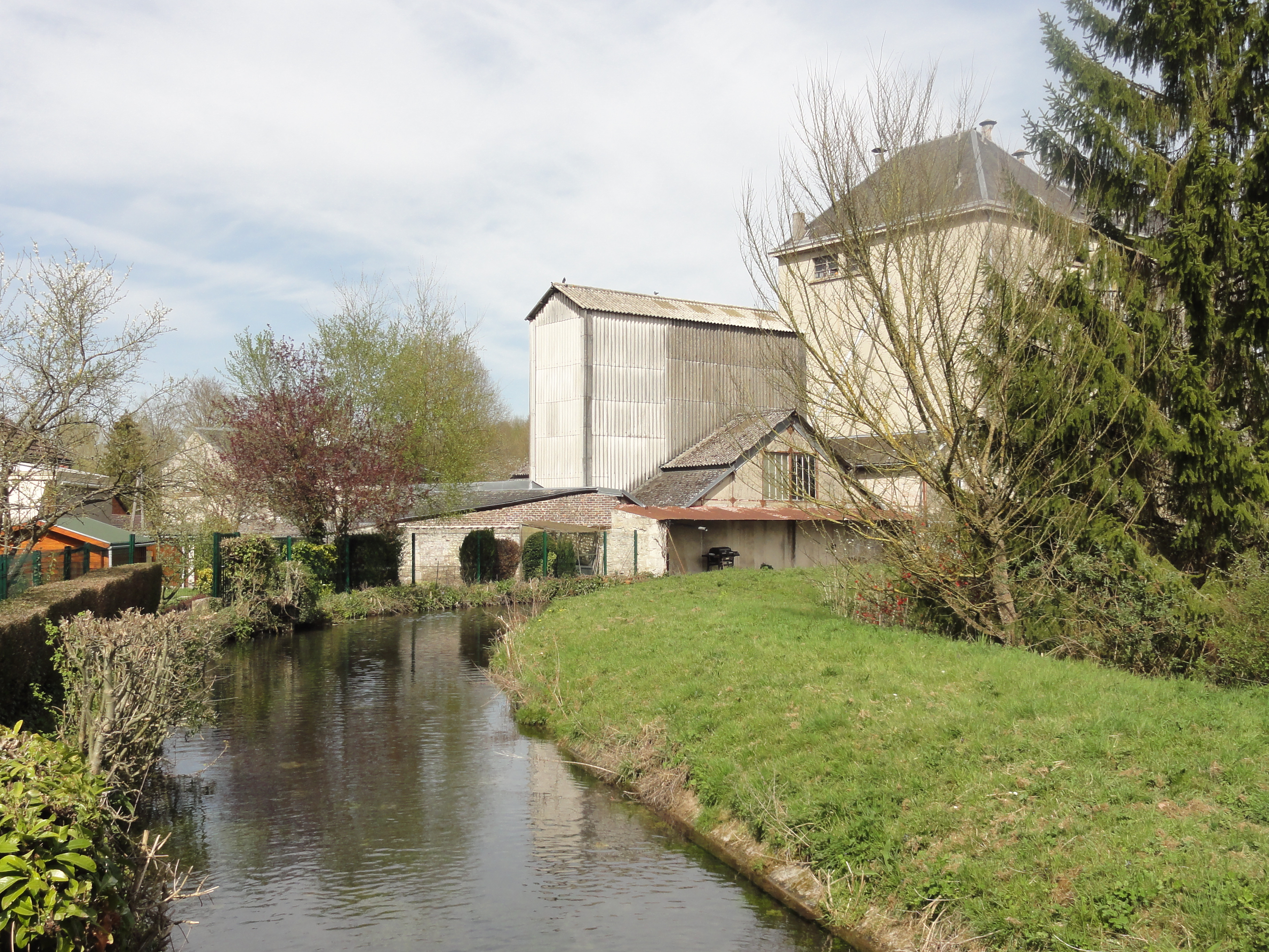 Village de Duvy (voir titre).